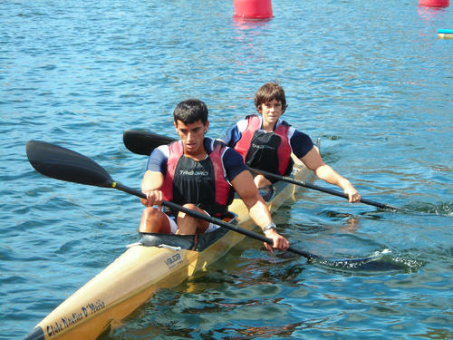 Soy yo y una gamba en una piragua